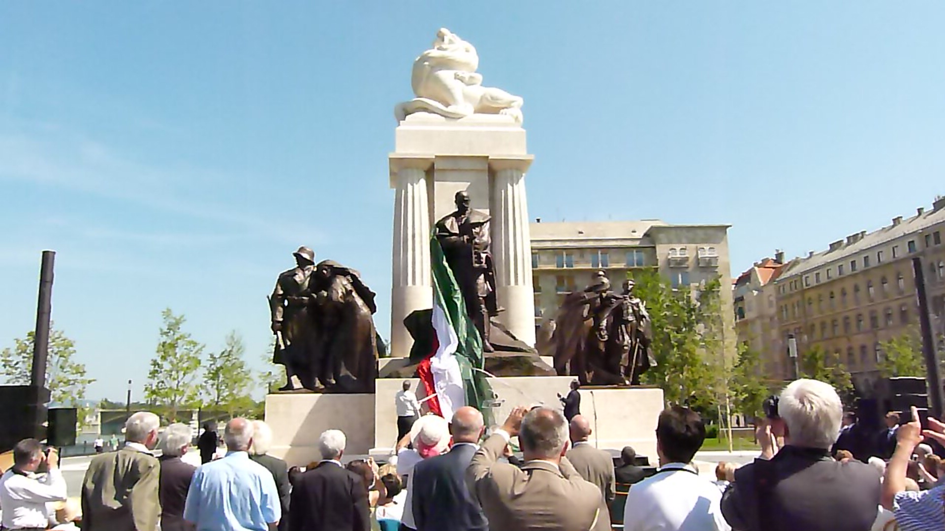 A felvételek 2014. június 9 –én, Pünkösd hétfőn készültek Budapesten, a Kossuth téren. Gróf Tisza István szobrának újraavatása. Beszédet mondott Orbán Viktor. A szoborcsoportot újraalkotta Elek István szobrász. A szoborcsoportot Zala György és Orbán Antal tervei alapján 1934. április 22-én (Tisza István születésnapján) állítottak fel. 17 méter magas volt, talapzata süttői mészkőből készült. Az oroszlánt 36 köbméter kőből faragták ki, és 12 darabból állították össze. A második világháború folyamán megsérült, majd 1945 tavaszán ismeretlenek lerombolták. A szobor főalakját, a 18 mázsányi töredéket később beolvasztották. Az emlékmű meg nem semmisített darabjai közül a földművelőket ábrázoló szoborcsoport Esztergomba került, A katona búcsúja című mellékcsoportot a Hűvösvölgyi úti laktanya udvarára, majd a keceli Pintér Művek haditechnikai gyűjteményébe vitték, a posztamens tetejét díszítő kőoroszlánt pedig 1948-ban a Hegyalja út végében, a hajdani tabáni temető helyén állították fel, majd a hatvanas években nyersanyagként fiatal művészeknek osztották ki. Így került az oroszlán feje egy fiatal szobrászművészhez, aki érintetlenül megőrizte, és ma is szentendrei háza kertjében tartja. Cimkék: Gróf Tisza István Budapest Kossuth tér Orbán Viktor Zala György Orbán Antal 2014 Steindl Imre Program Elek István szobrász Szvorák Katalin népdalénekes Források: Orbán: Van, akit nem elég egyszer megölni